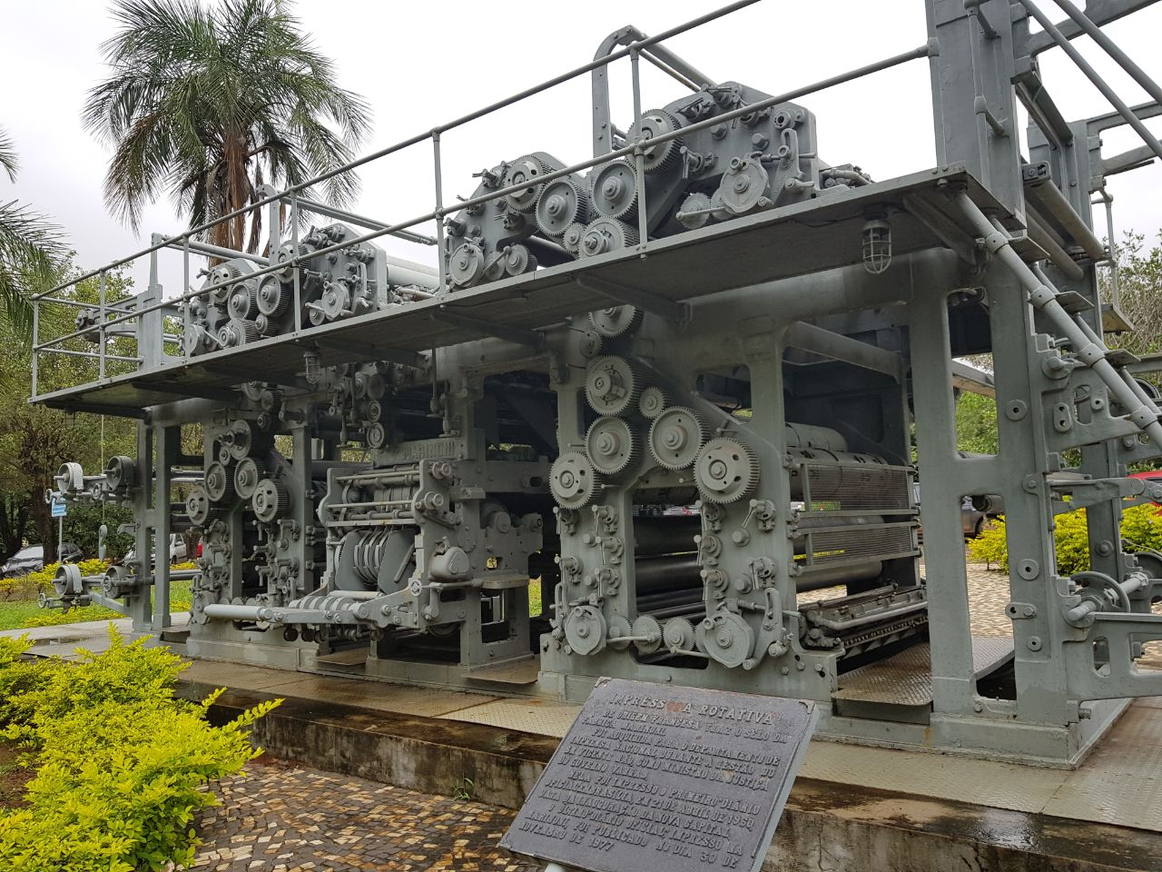 Máquina rotativa na praça do Praça do Palácio da Imprensa Nacional em Brasília.